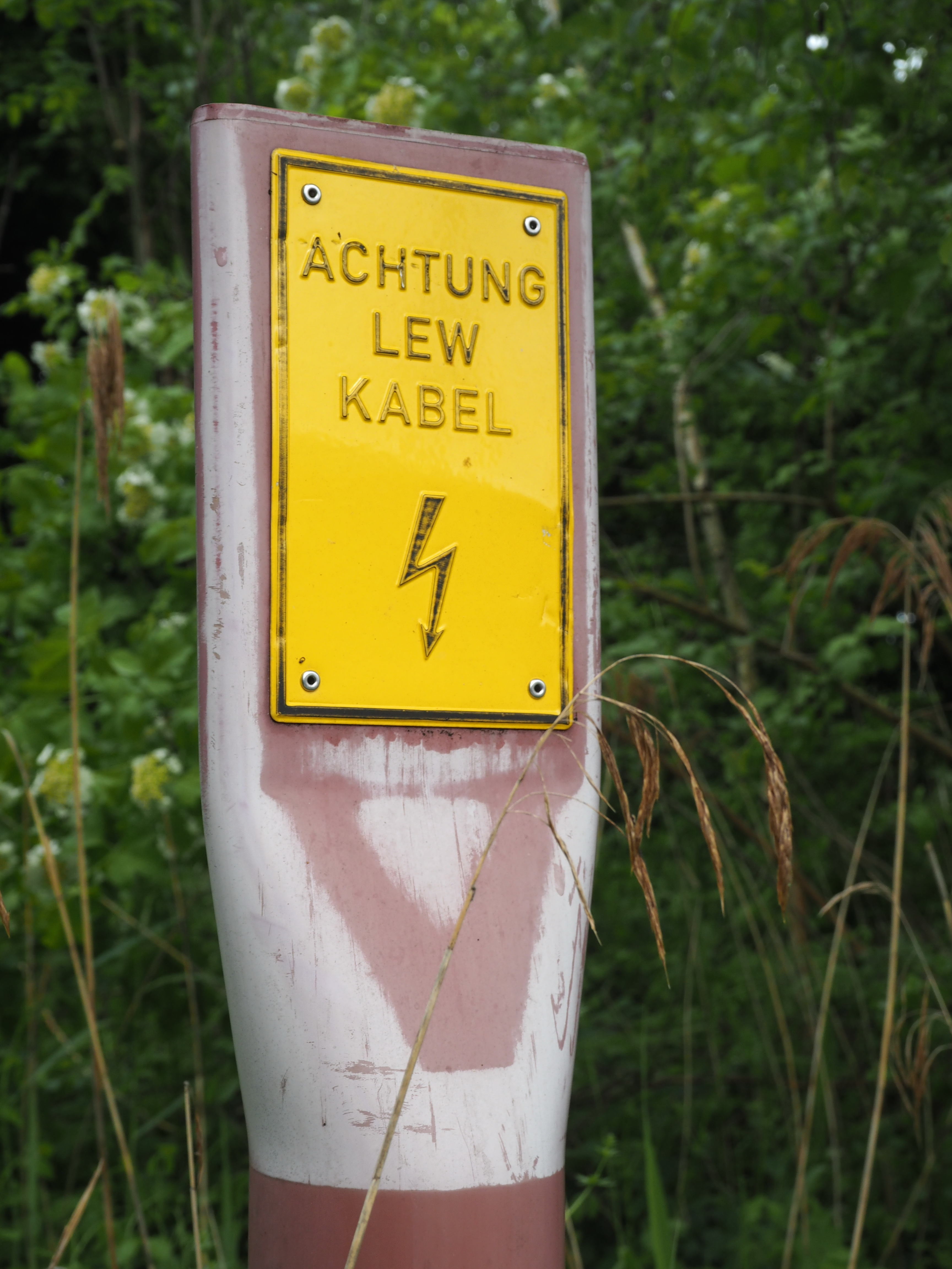 Hinweisschild auf Kabel am Wertachwehr bei Ettringen